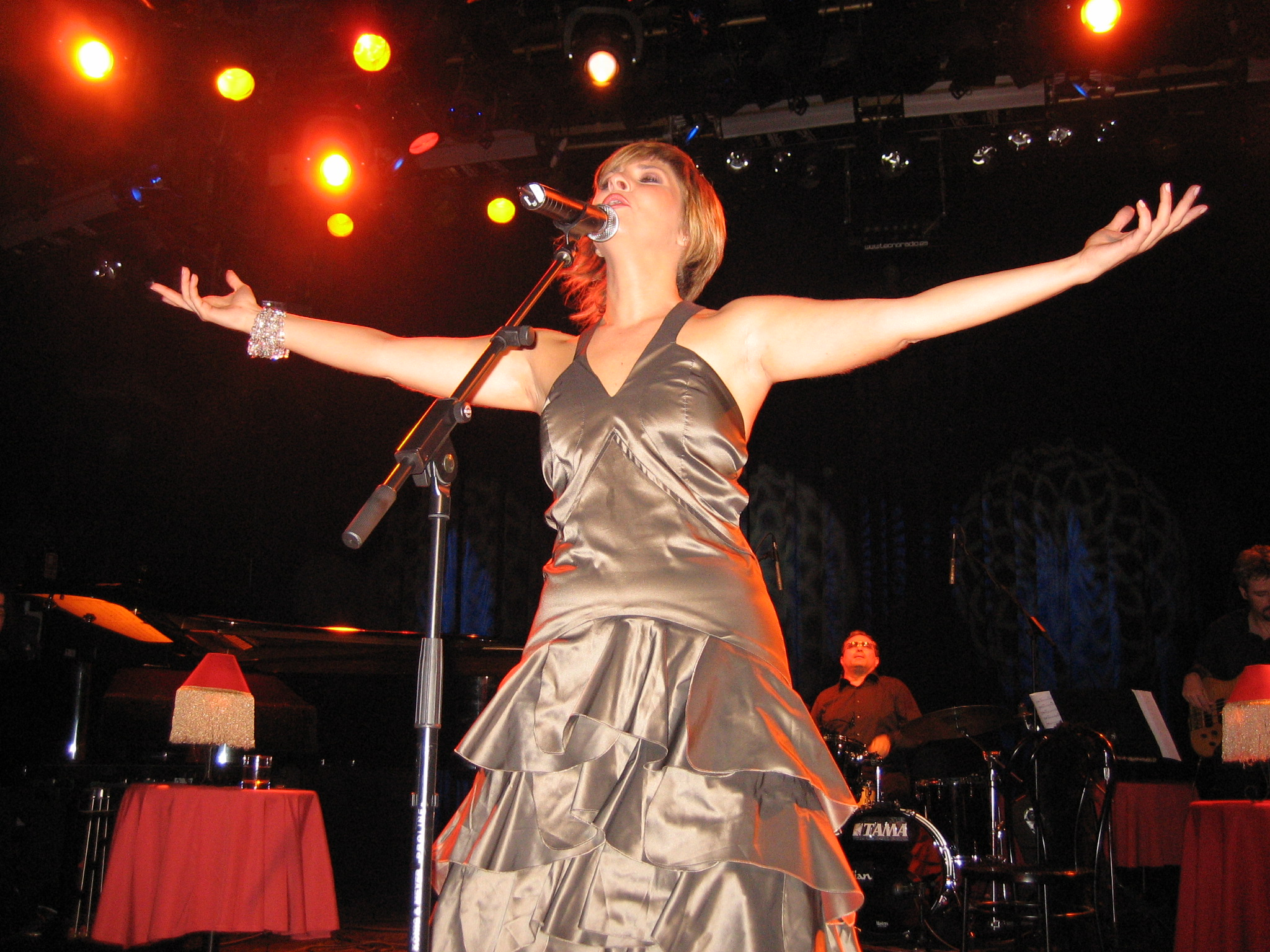 Pasión Vega en escena - 2